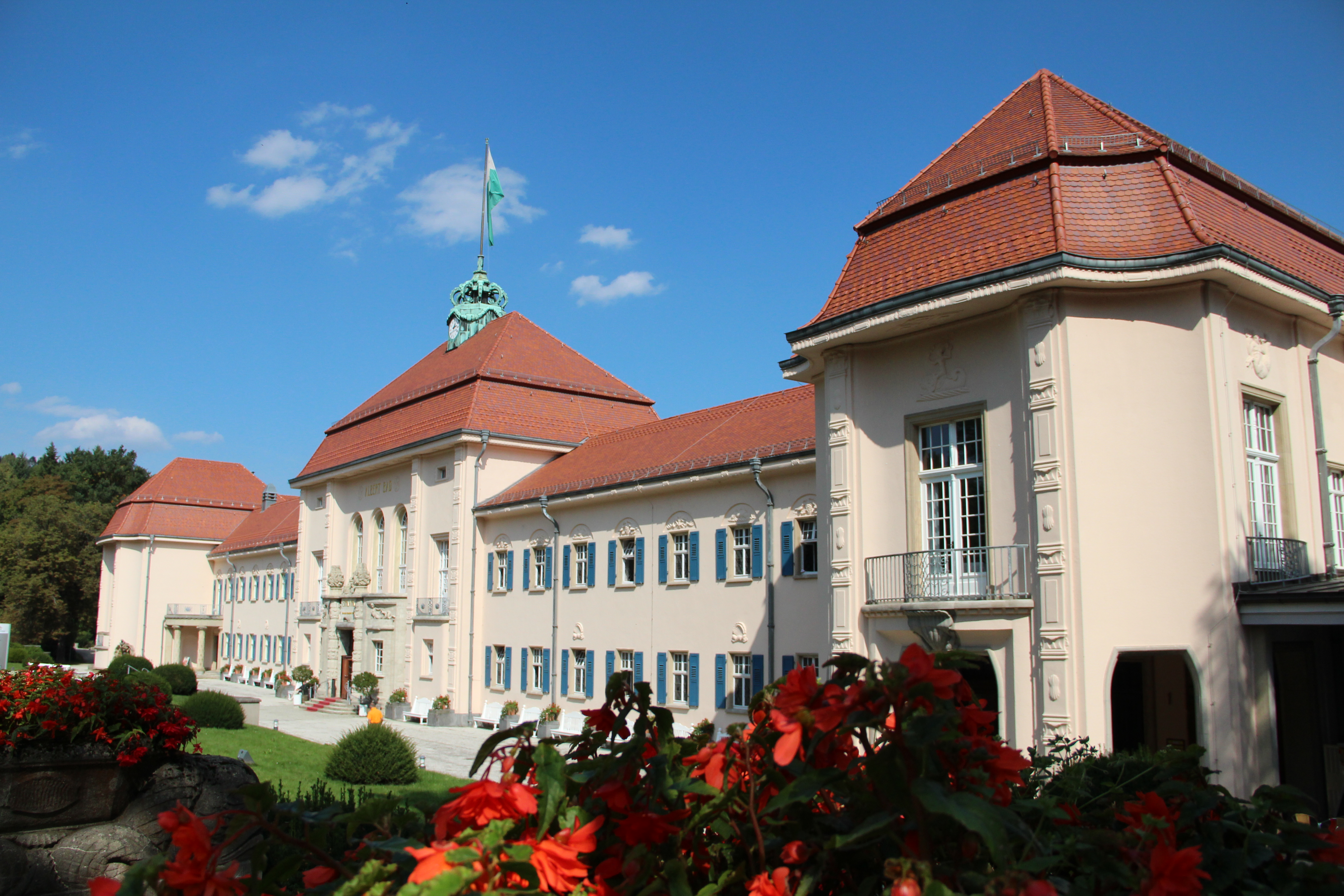 Bad Elster, König Albert Bad (Vogtland, Sachsen 2012)